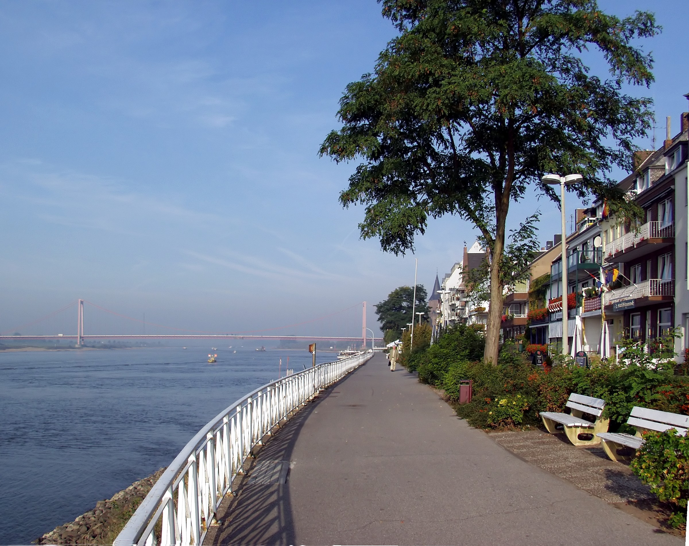 Rheinpromenade (2003) Emmerich am Rhein